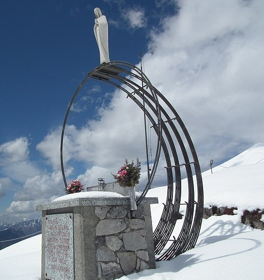 Monumento altare della Madonna degli Alpini in Val del Riso - Gorno (BG)